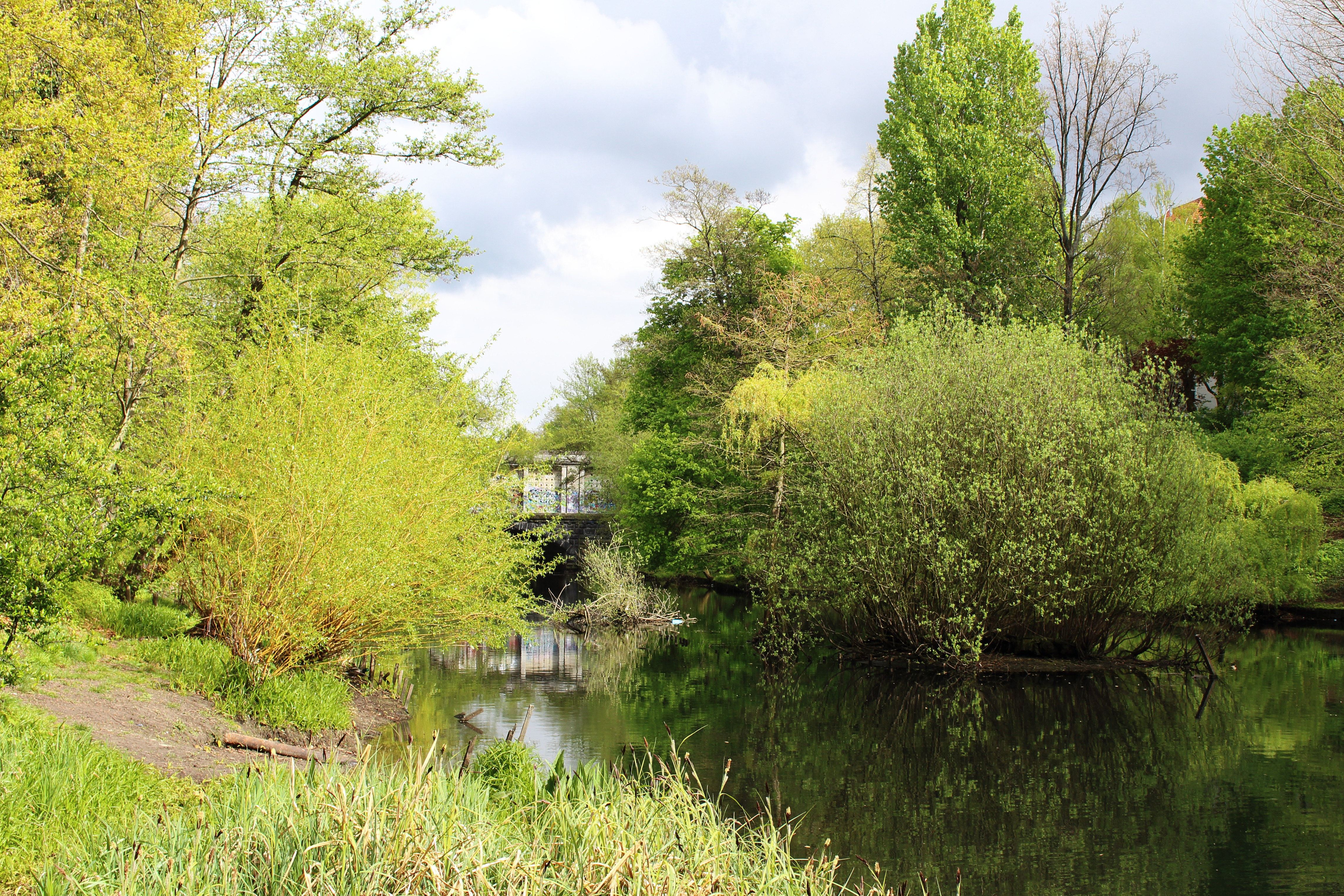 Westlicher Fennsee in Berlin-Wilmersdorf mit Blick auf die Barbrücke